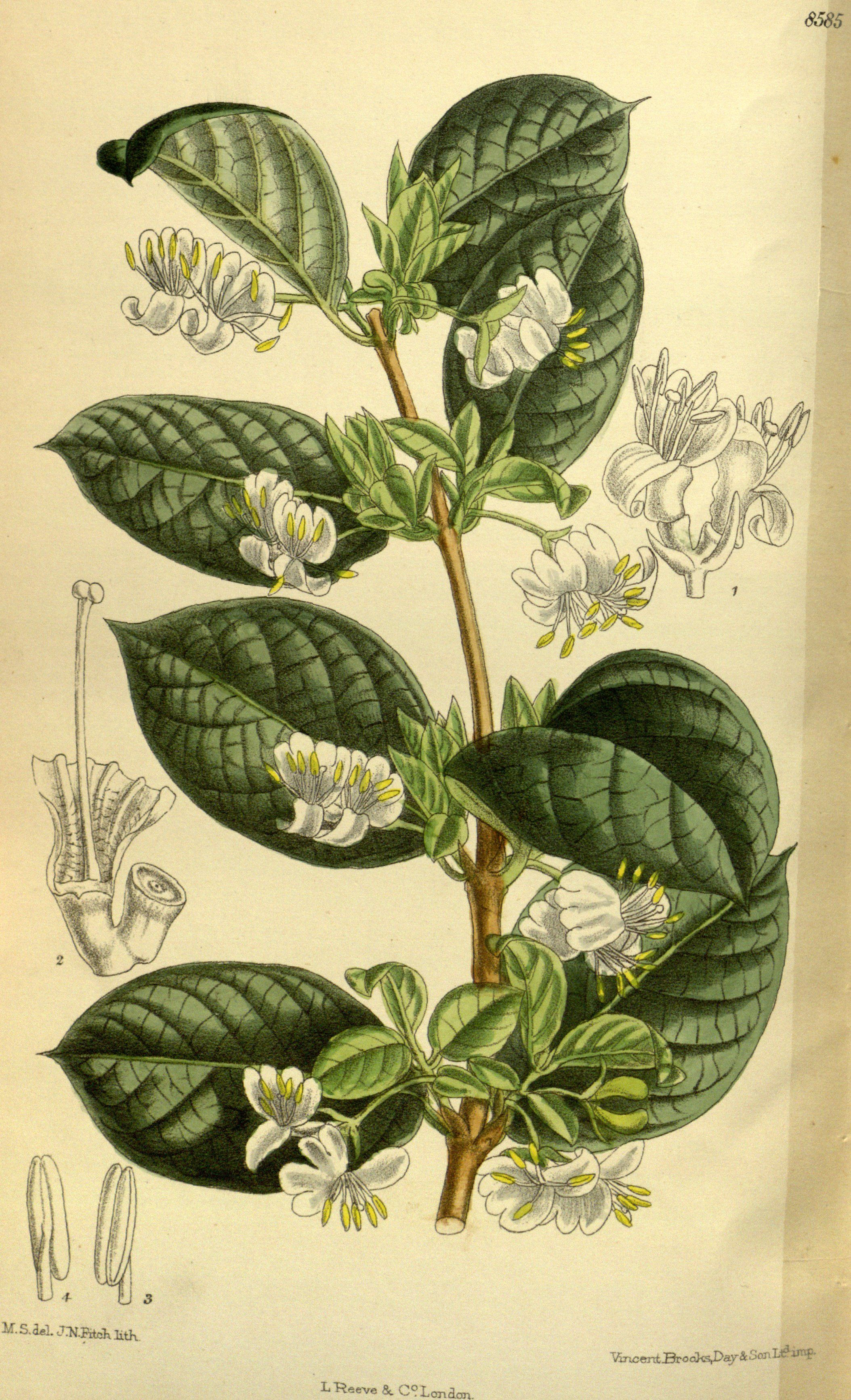 Lonicera fragrantissima, Caprifoliaceae